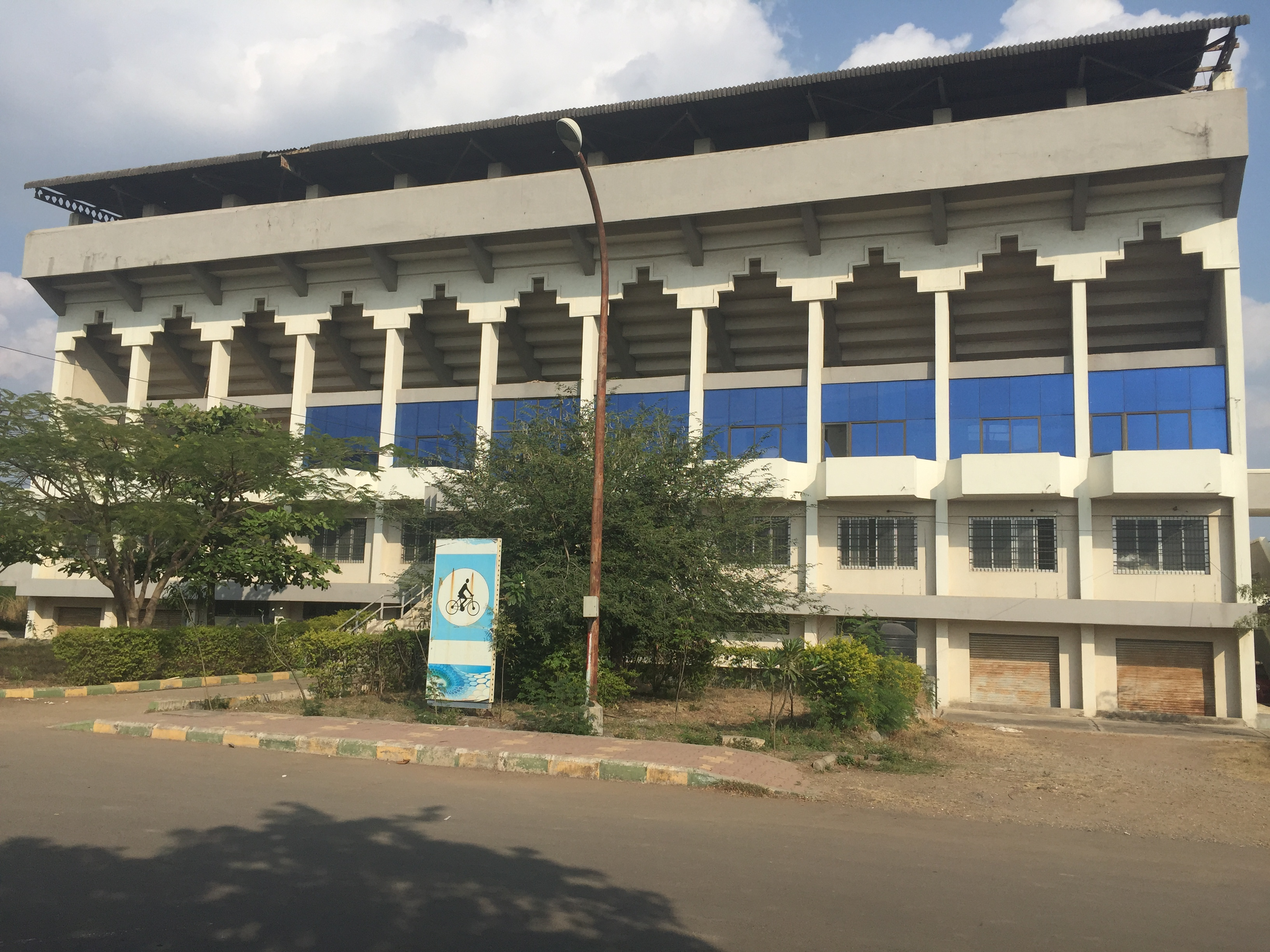 Shree Shiv Chhatrapati Sports Complex velodrome